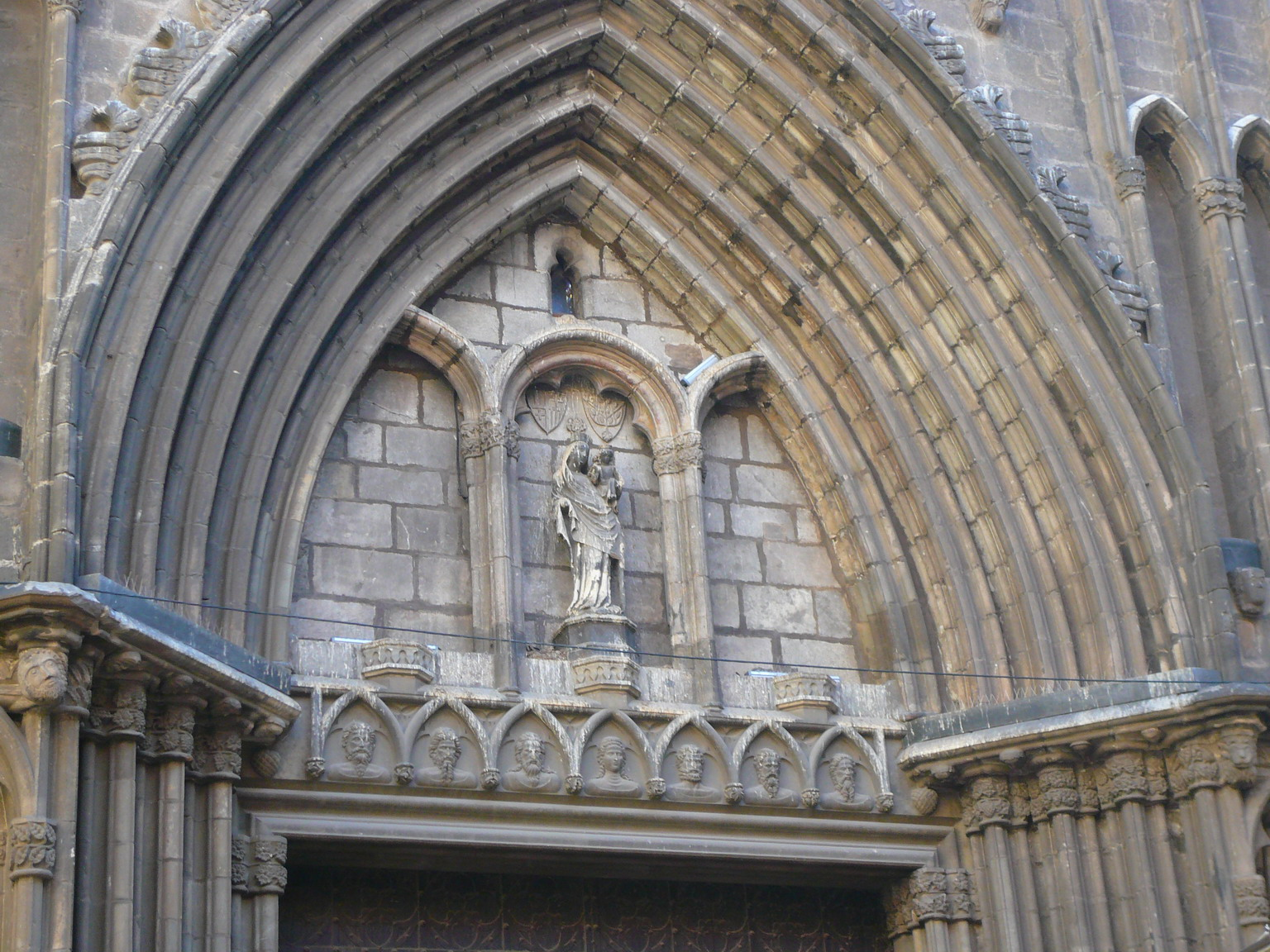 Porta principal de l'església_de_Santa_Maria_del_Pi de Barcelona